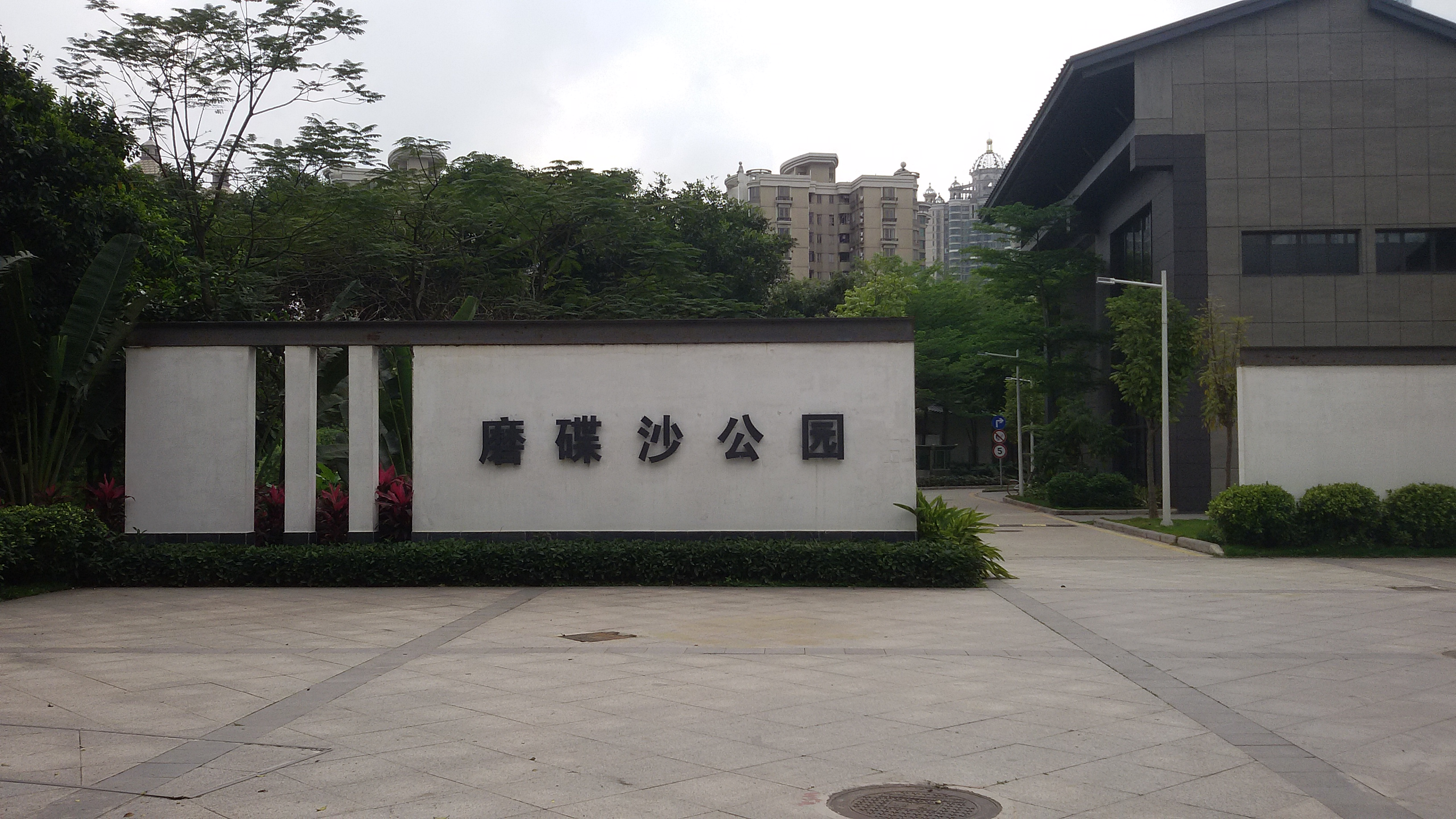 粵語: 磨碟沙公園